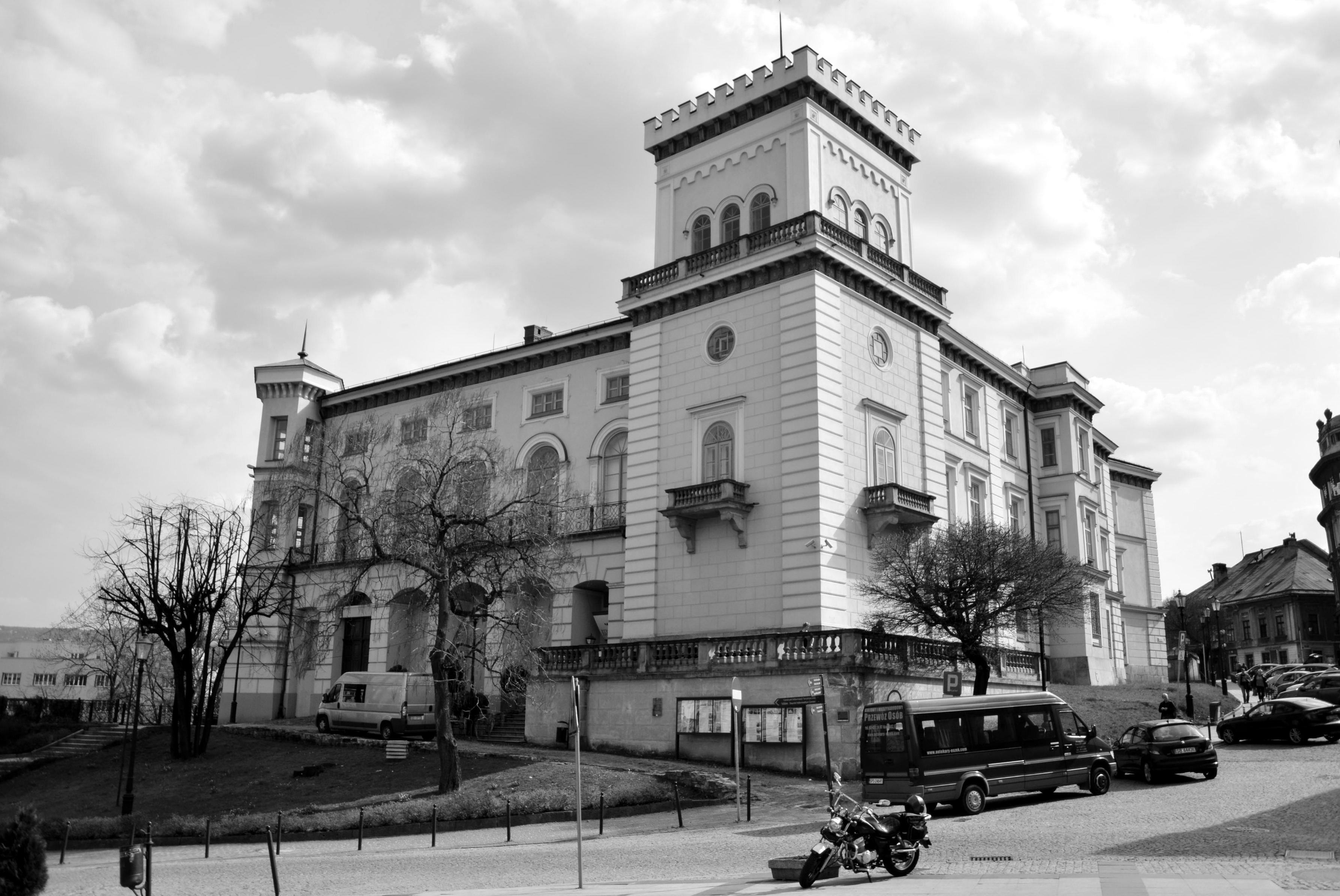 Black and white Bielsko-Biała